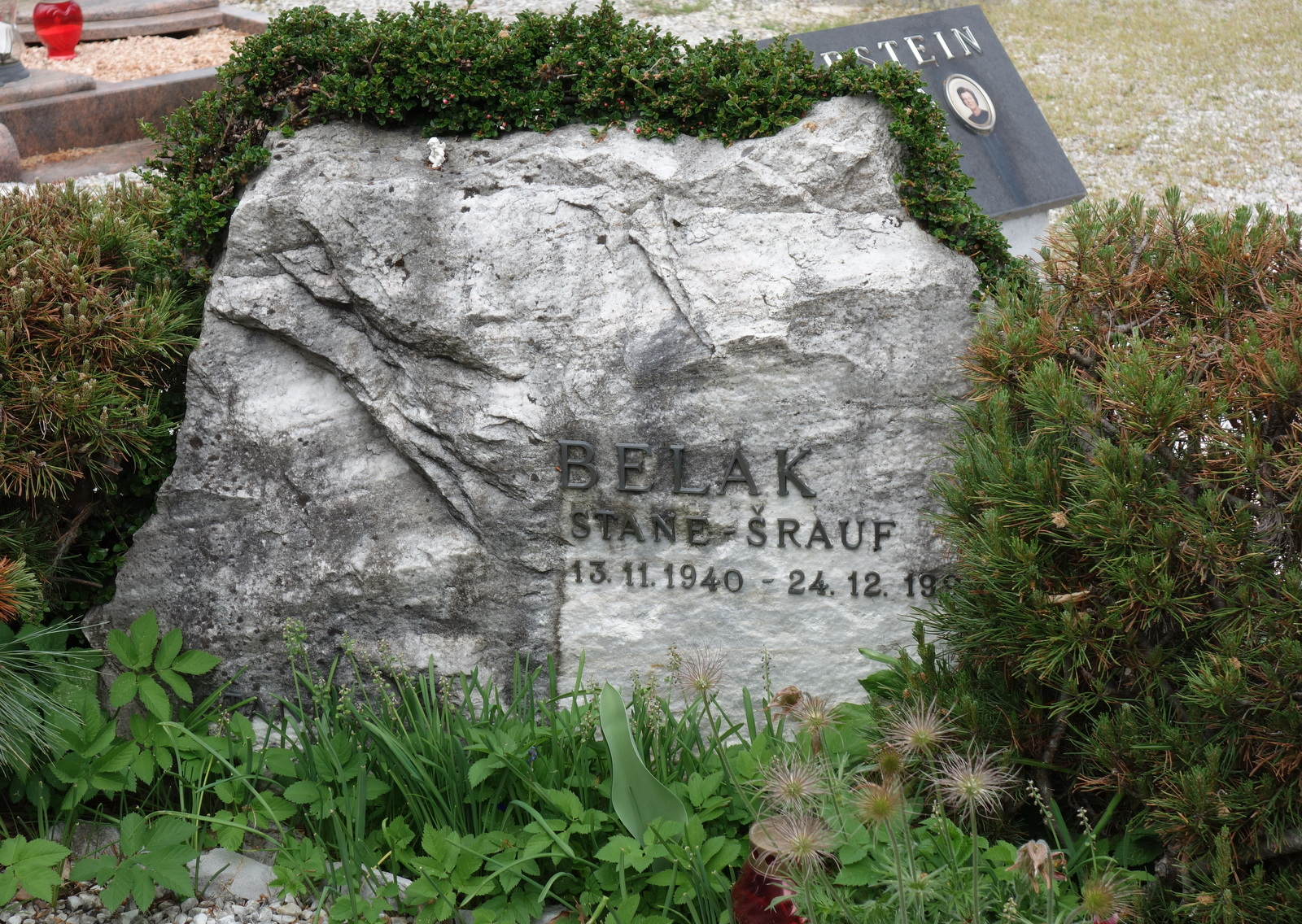 Nagrobnik Staneta Belaka - Šraufa na pokopališču na Blejski Dobravi